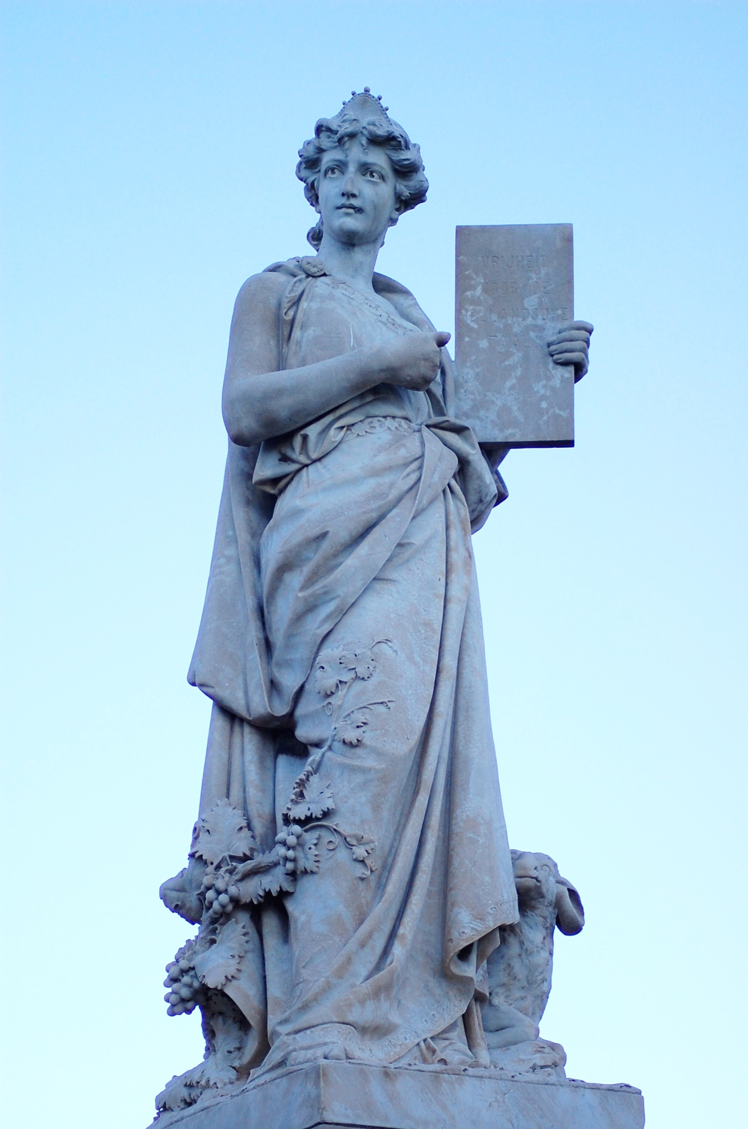 Nederlandse taalmonumentInscriptie:VRIJHEIDVOOR DEHOLLANDSCHETAAL